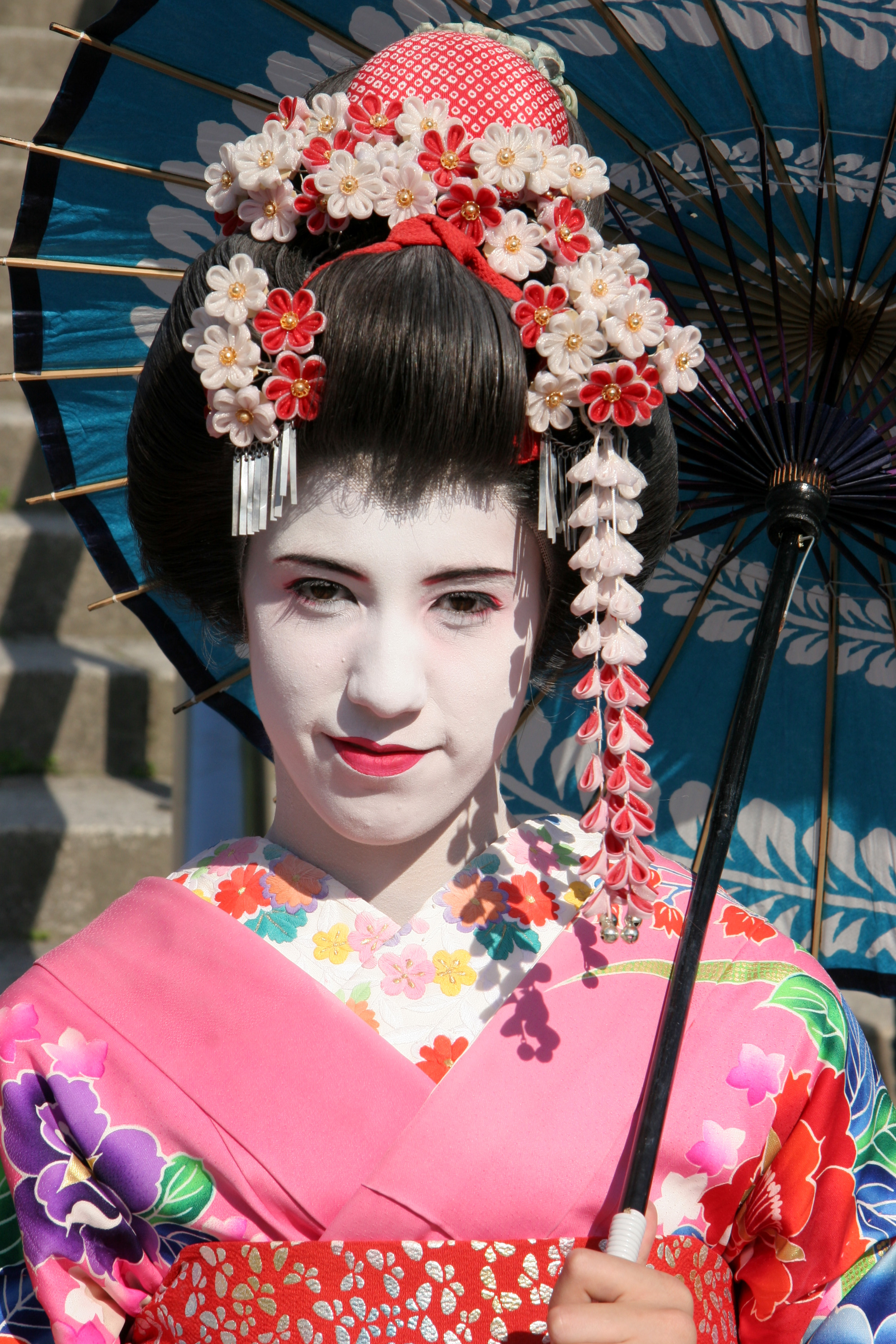 Japon, Kyoto, touriste costumée en geisha